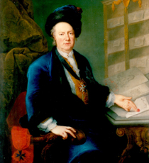 Adam Otto von Viereck (1684 - 1758), Preußischer Staatsminister Datum: um 1750 Urheber: unbekannter Maler Quelle